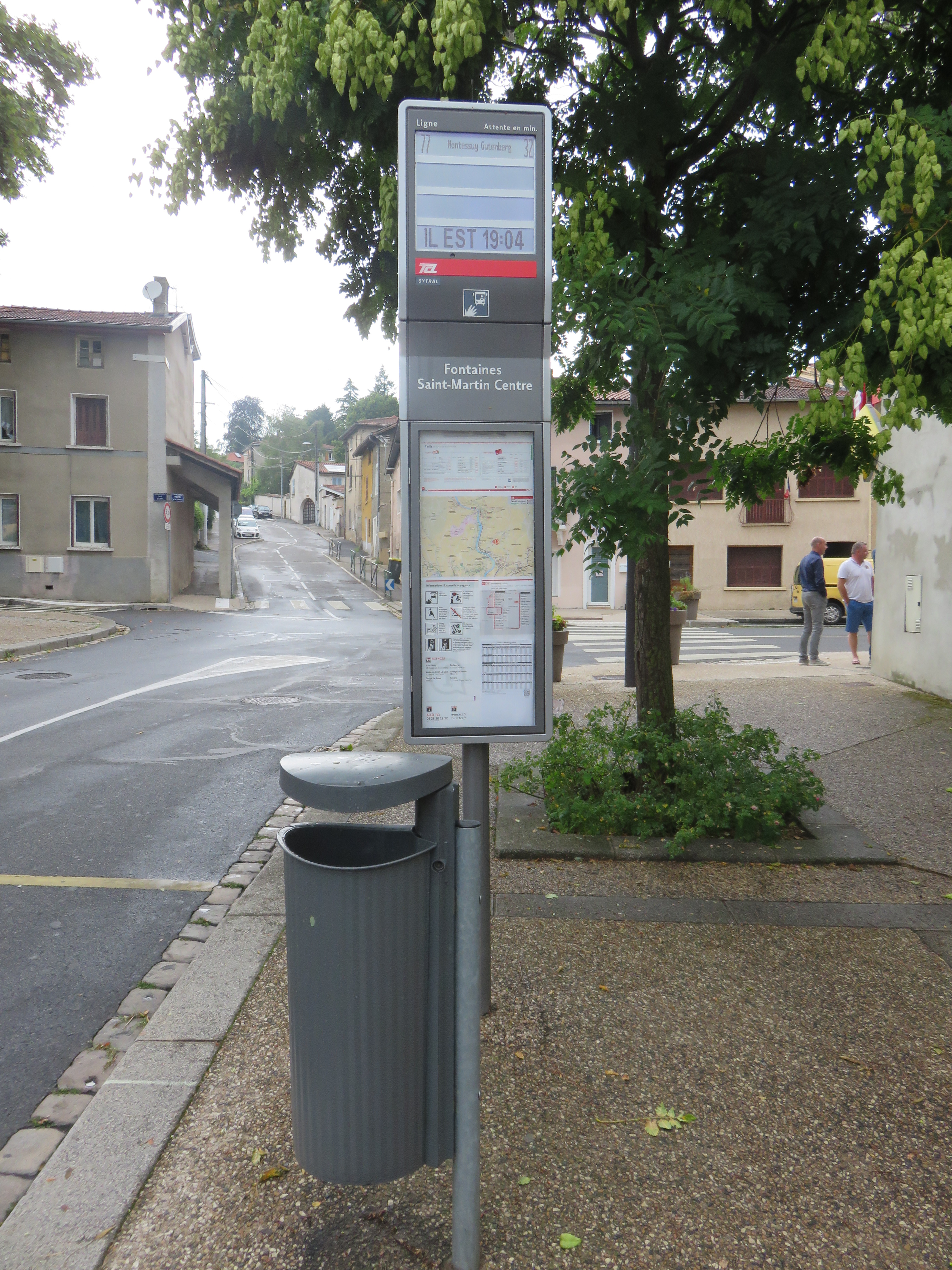 Arrêt de bus TCL à Fontaines-Saint-Martin (Rhône, France).